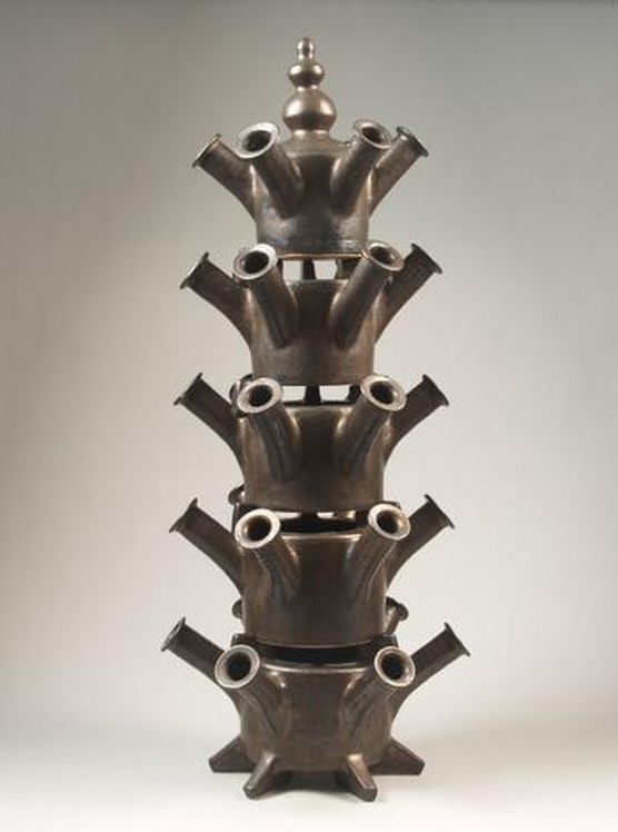 Titel: Tulpenvaas in 5 delen, metallic zwart geglazuurd Vervaardiger: Vaart, Jan van der Soort object: bloemenhouder Vervaardigingsdatum: 1962 - 1962 Vervaardiging plaats: Nederland